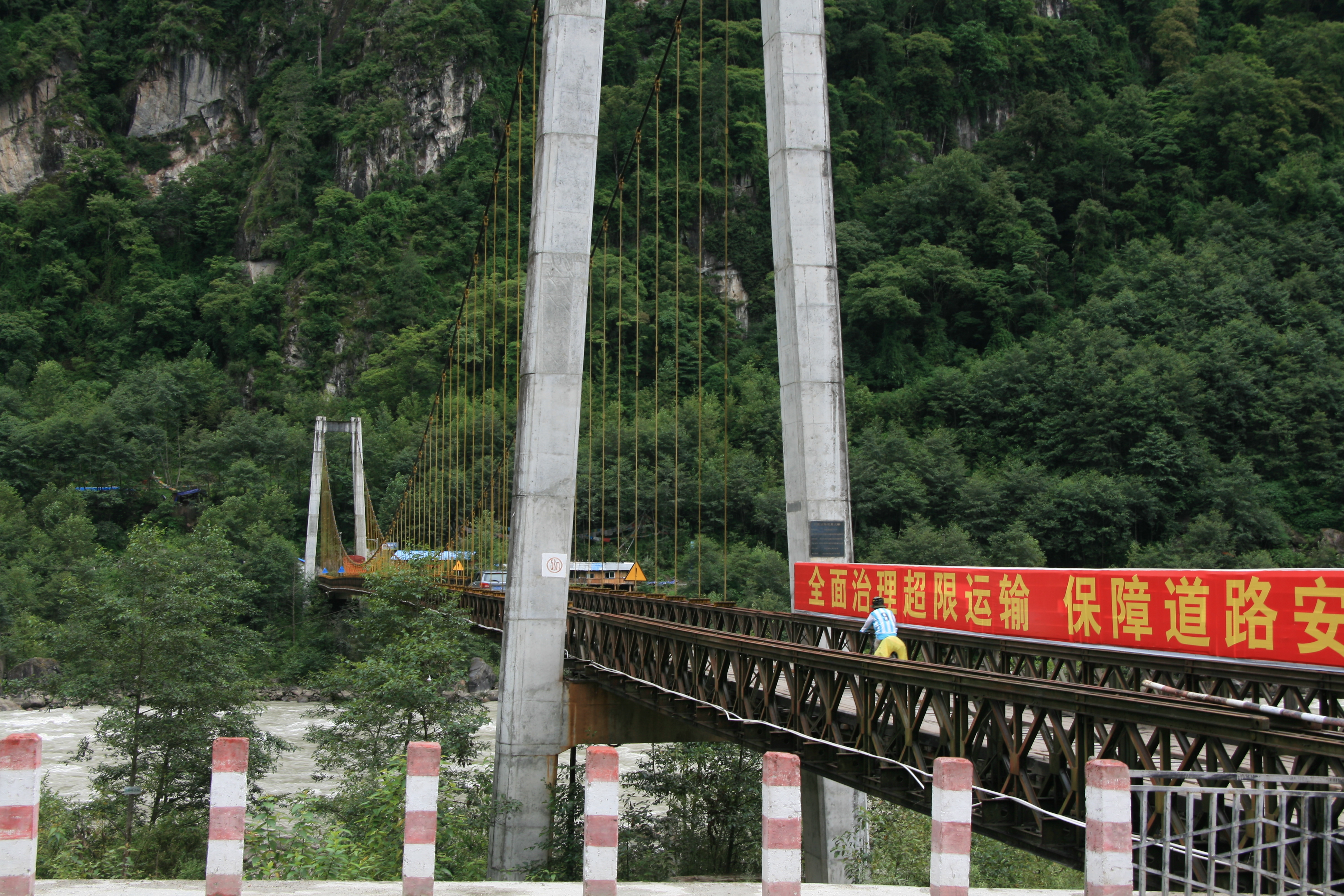 通麦大桥